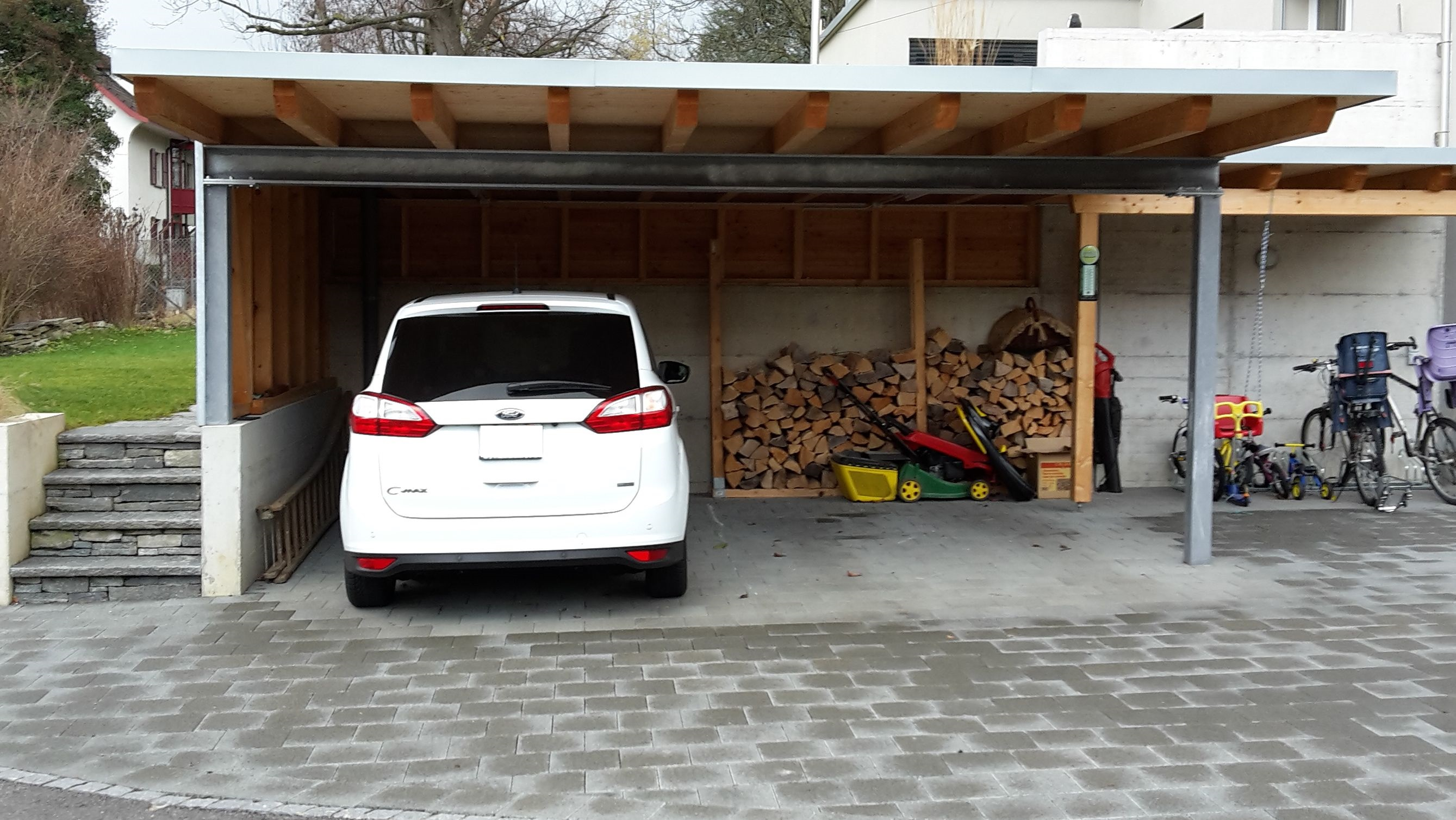 Carport für 2 PKW auf massiven Flachdach